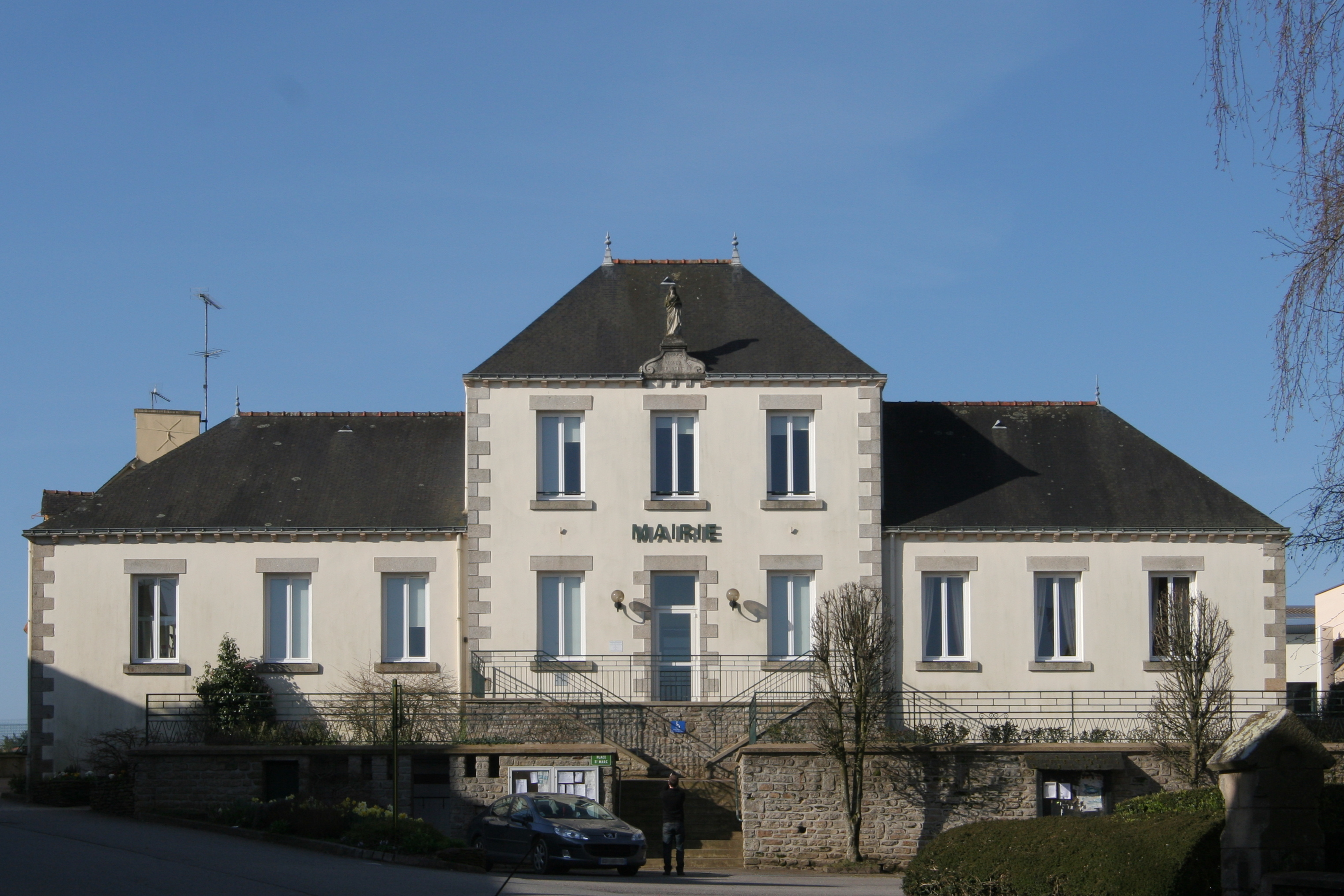 Mairie d'Augan.